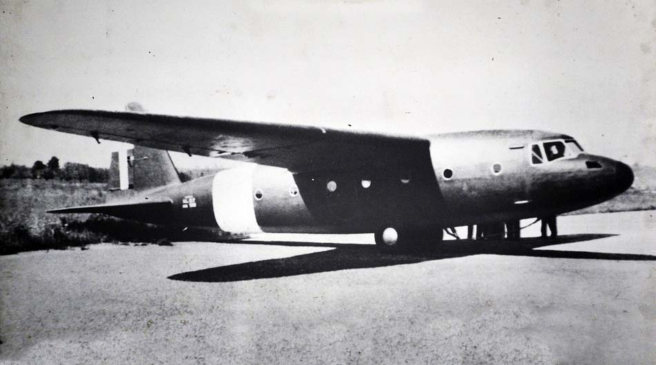 Aeronautica Lombarda AL-12P statique